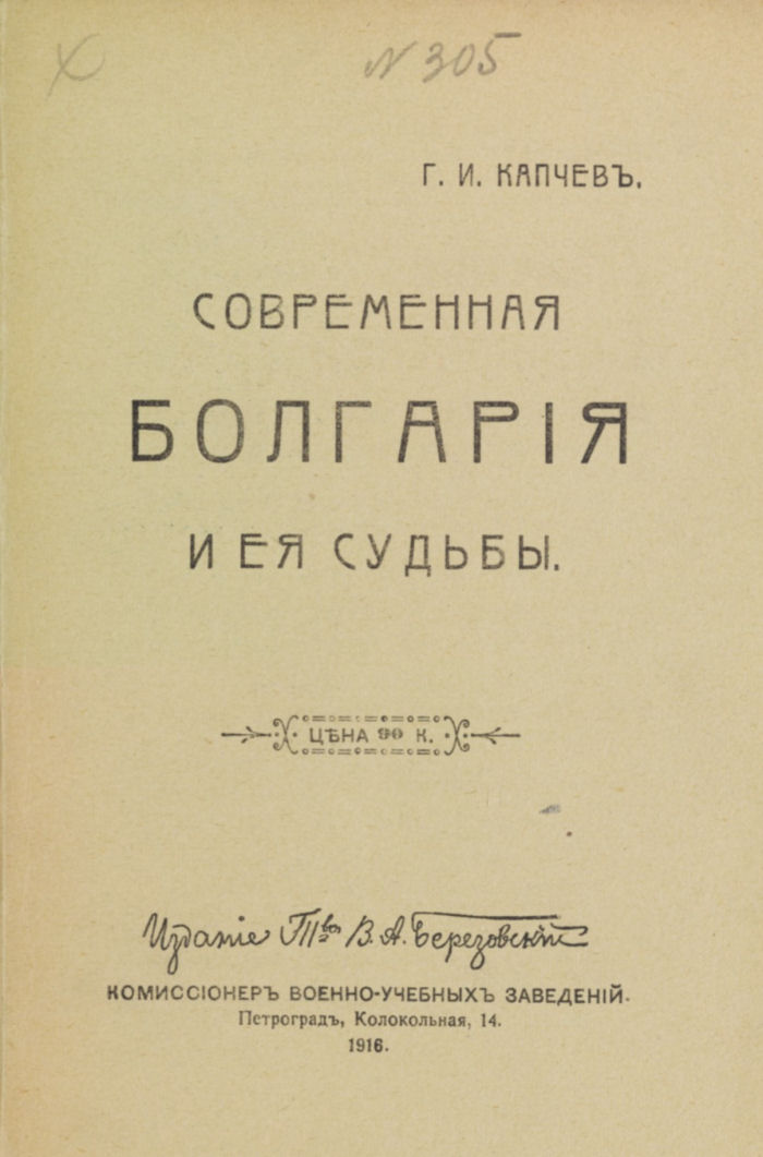 Георги Ивановъ Капчевъ. Современная Болгарія и ея судьбы. Т-во В.А. Березовскій", Комиссіонеръ военно-учебныхъ заведеній. Петроградъ, Колокольная, 14. 1916 Содержаніе: Вступленіе 5 1. Выступленіе Болгаріи на арену міровой войны 7 2. Руссофобство болгарскаго правительства 18 3. Софійскій процессъ о шпіонажѣ противъ Турціи и Болгаріи въ пользу Россіи 22 4. Введеніе Григоріанскаго календаря въ Болгаріи 27 5. Административное дѣленіе новозавоеванныхъ болгарами сербскихъ земель 30 6. Македонскіе дѣятели о внѣшней политикѣ Болгаріи 34 7. Внутреннее положеніе Болгаріи. Нѣмецкое иго 38 8. Политическія перспективы Болгаріи и ея отношенія къ союзникамъ Германіи Австро-Венгріи и Турціи.—Центральныя державы и ихъ отношеніе къ союзу съ Болгаріей 44 10. Экономическое и финансовое положеніе Болгаріи 56 11. Болгарская армія 65 12. Общественное настроеніе въ Болгаріи, въ связи съ выступленіемъ русскихъ войскъ на Балканахъ. Грядущія судьбы Болгаріи 71 - Схема административнаго дѣленія завоеванныхъ земель Болгаріи - Схема расположенія Болгарскихъ армій ... августа 1916 года